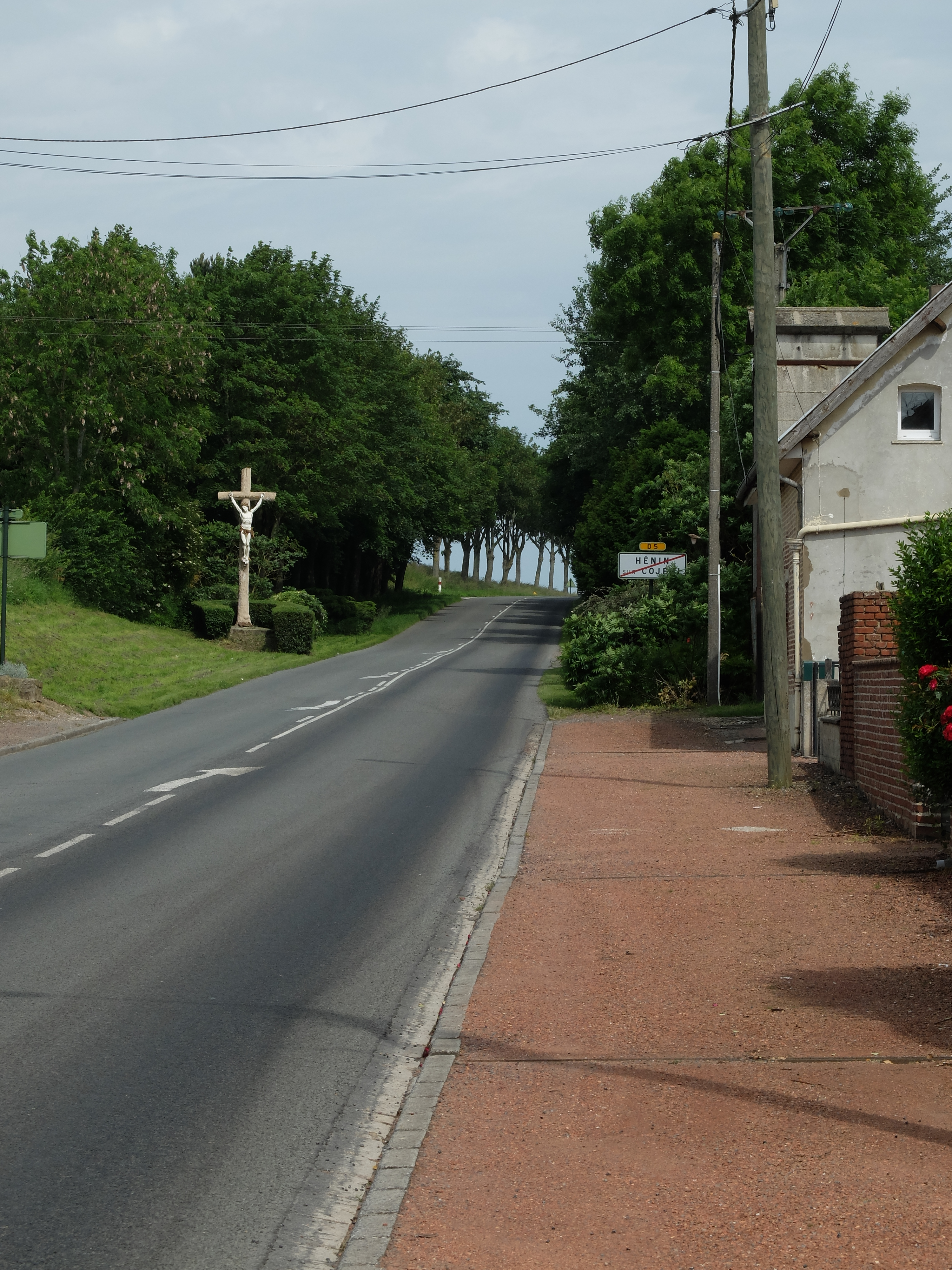 Vue de la départementale RD 5 à Hénin-sur-Cojeul. Un calvaire est visible.